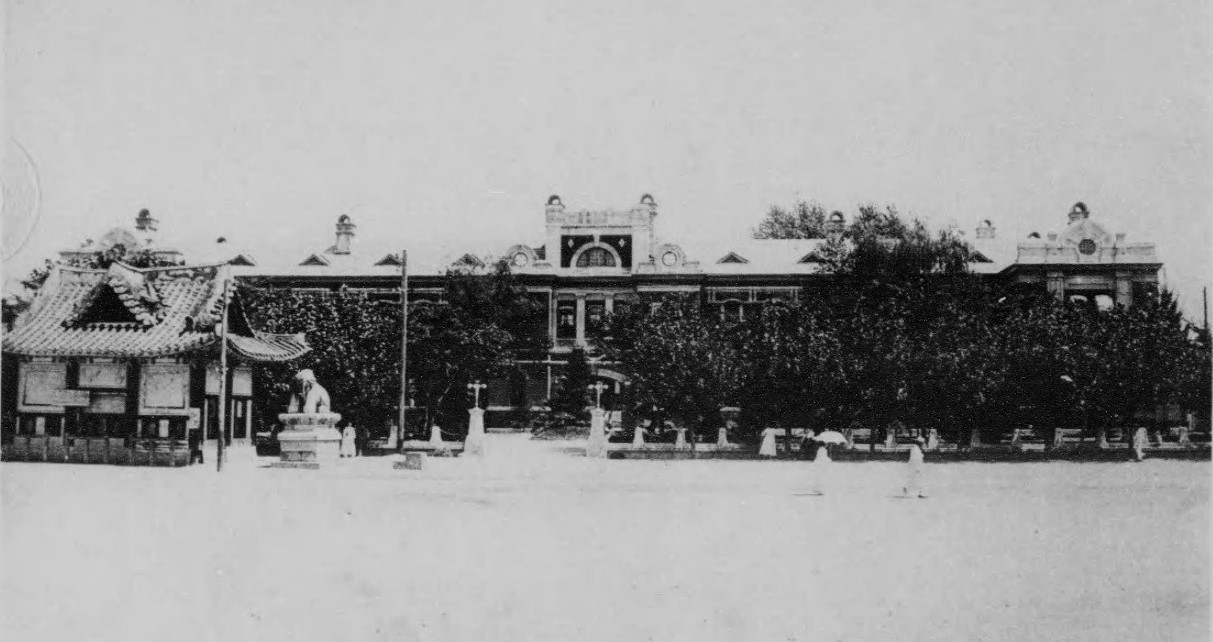 京畿道 (日本統治時代)の京畿道庁 朝鮮写真帖 (朝鮮総督府, 1921)